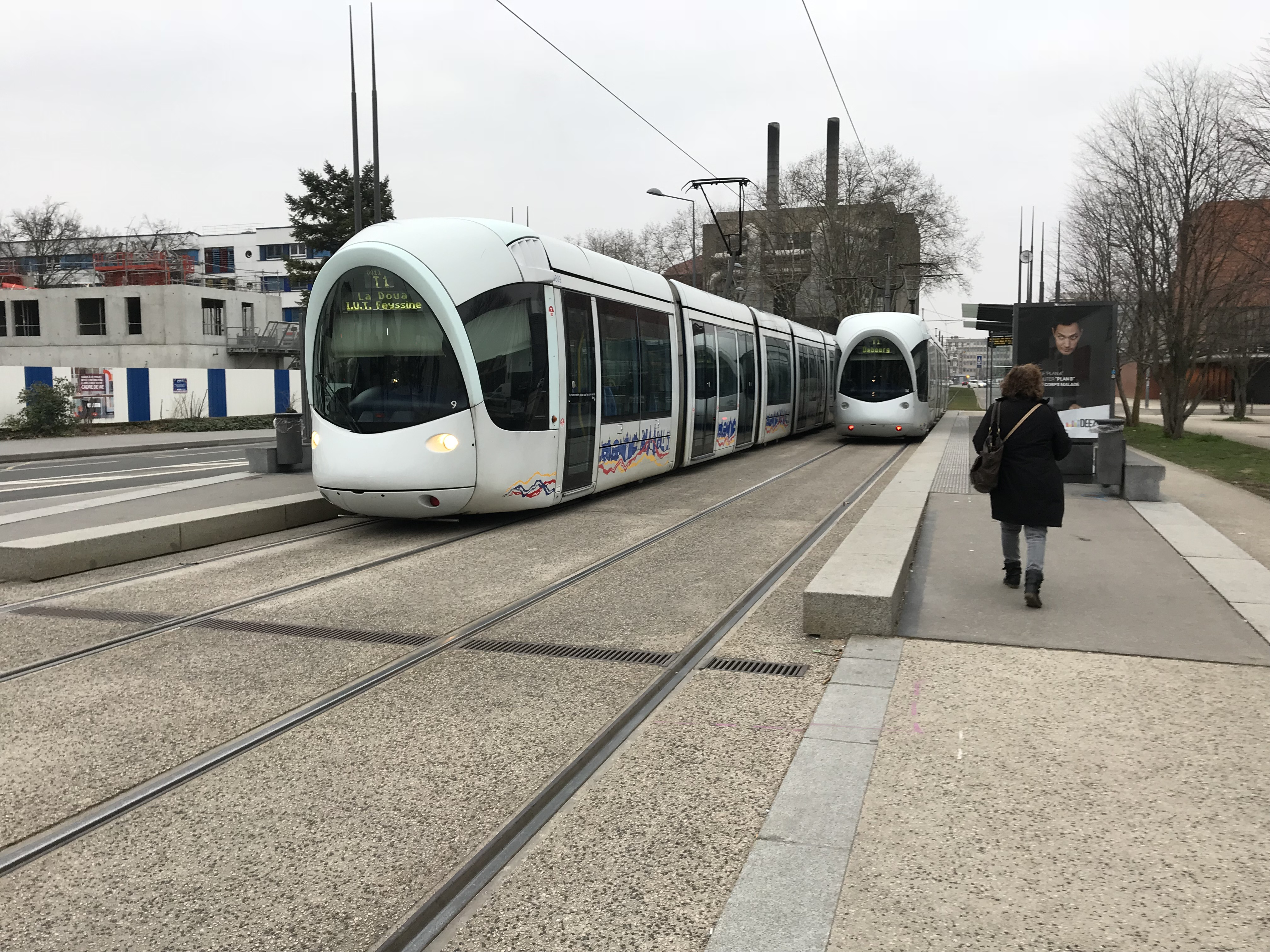 Tramways à la station Einstein à Villeurbanne.